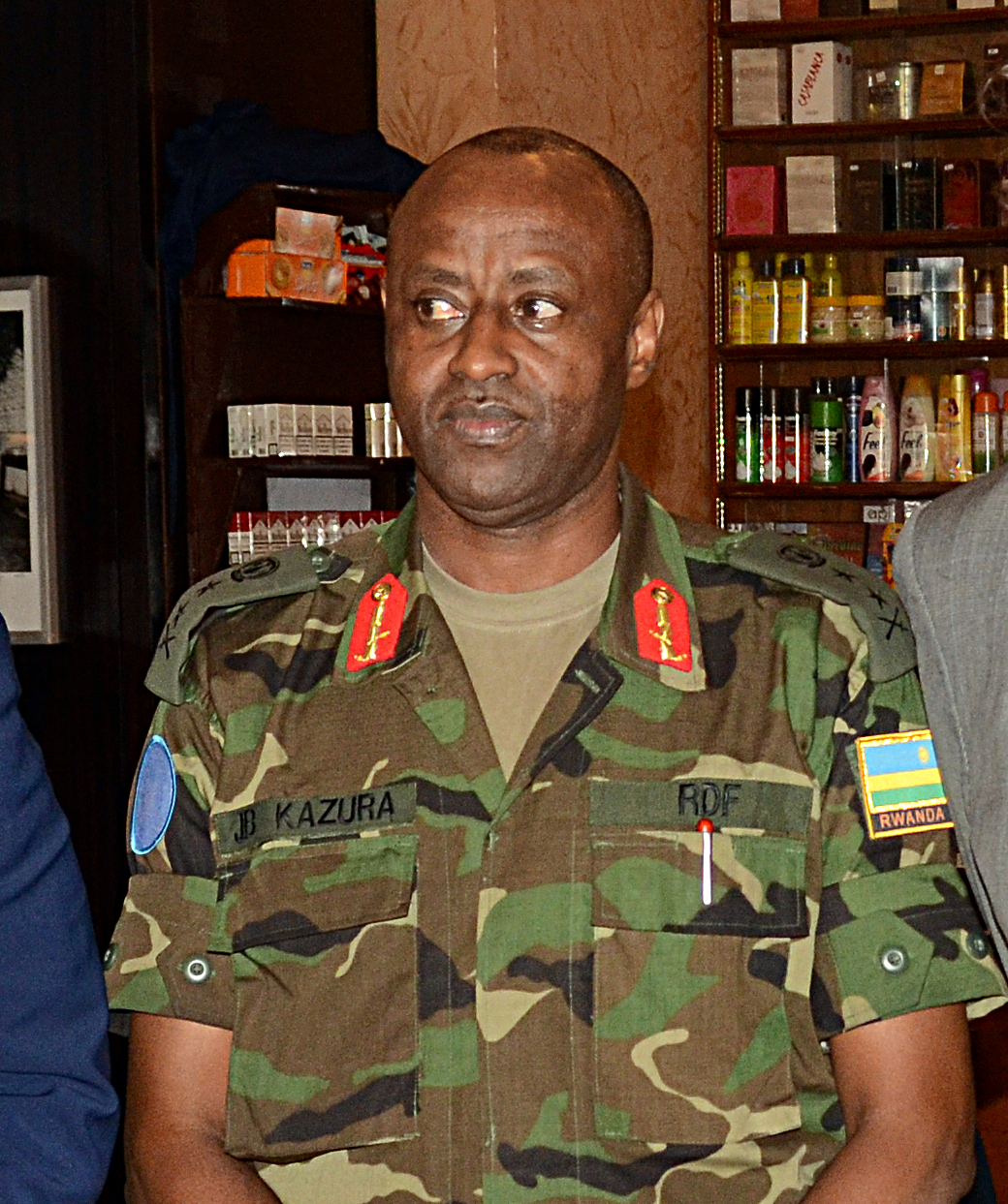 Général Jean Bosco Kazura à Bamako en 2013